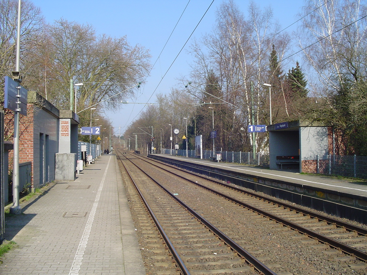 Bahnhof Solingen Vogelpark (S-Bahn)